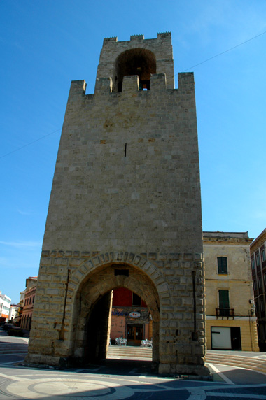 Oristano, torre di San Cristoforo